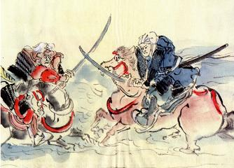 佐藤正持『皇朝画史』 倉敷市立美術館所蔵